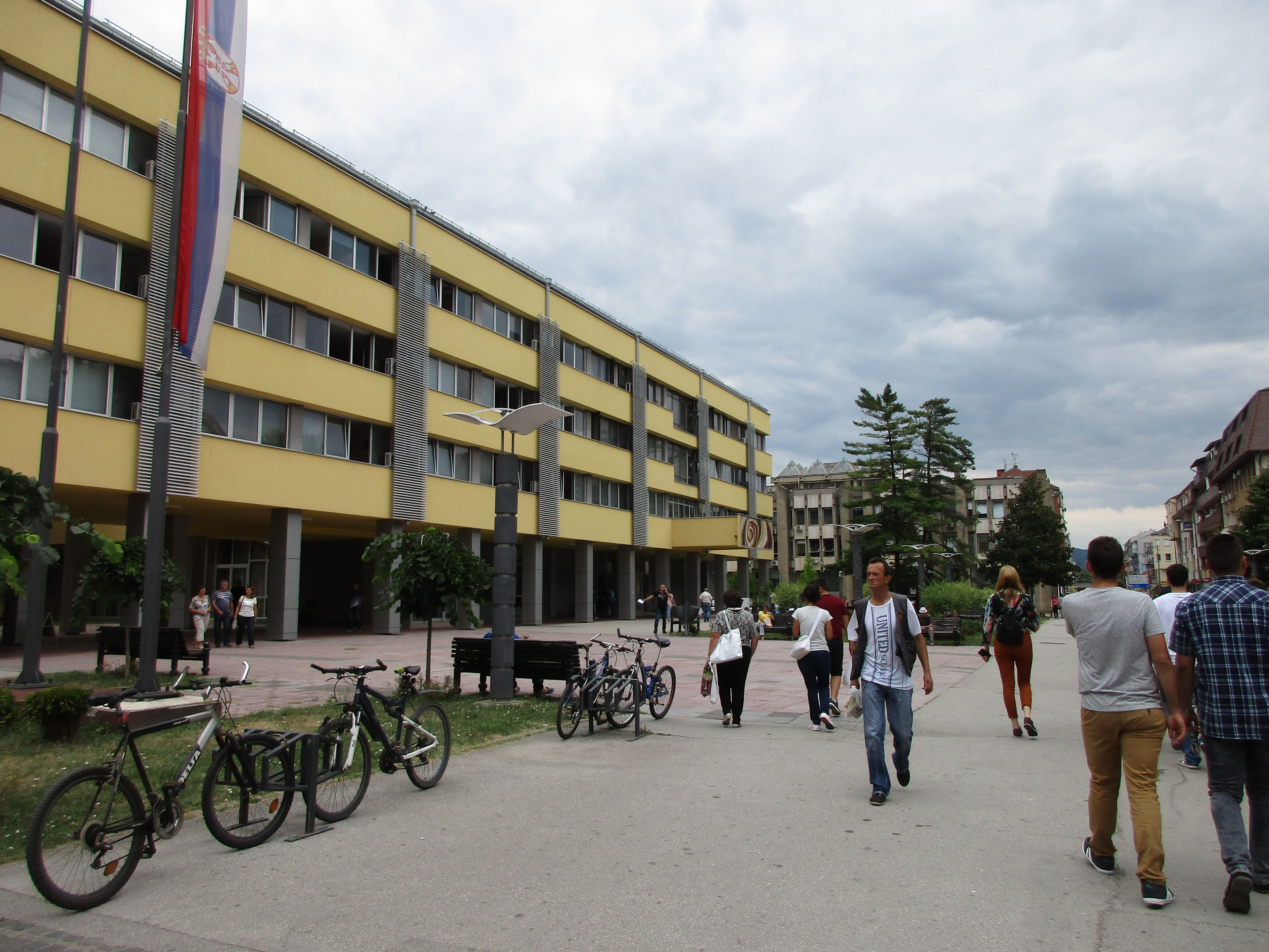 Srpski (latinica): Foto tura u Kraljevu